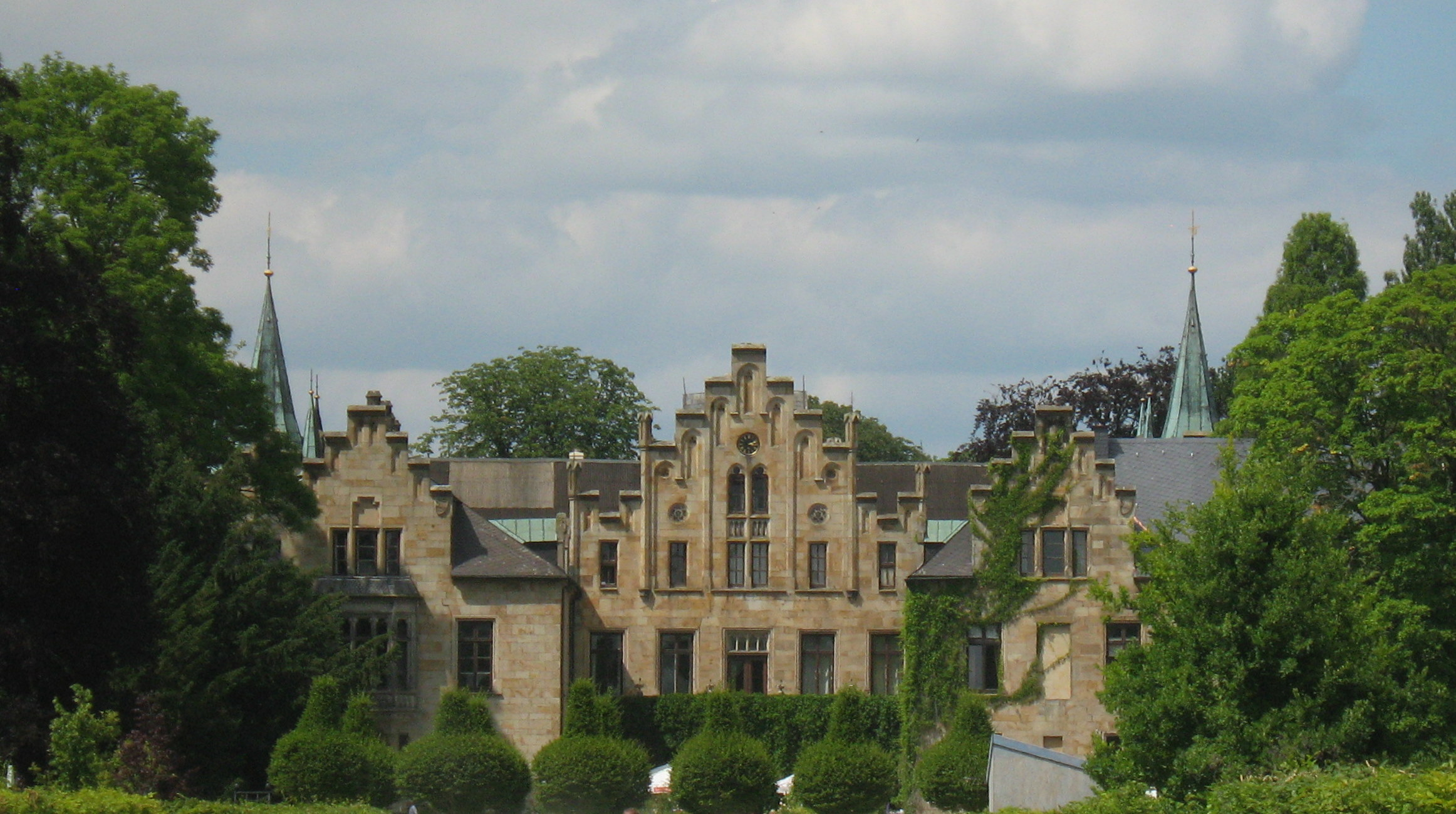 Schloss Ippenburg in der Nähe vom Ort "Bad Essen" 2010